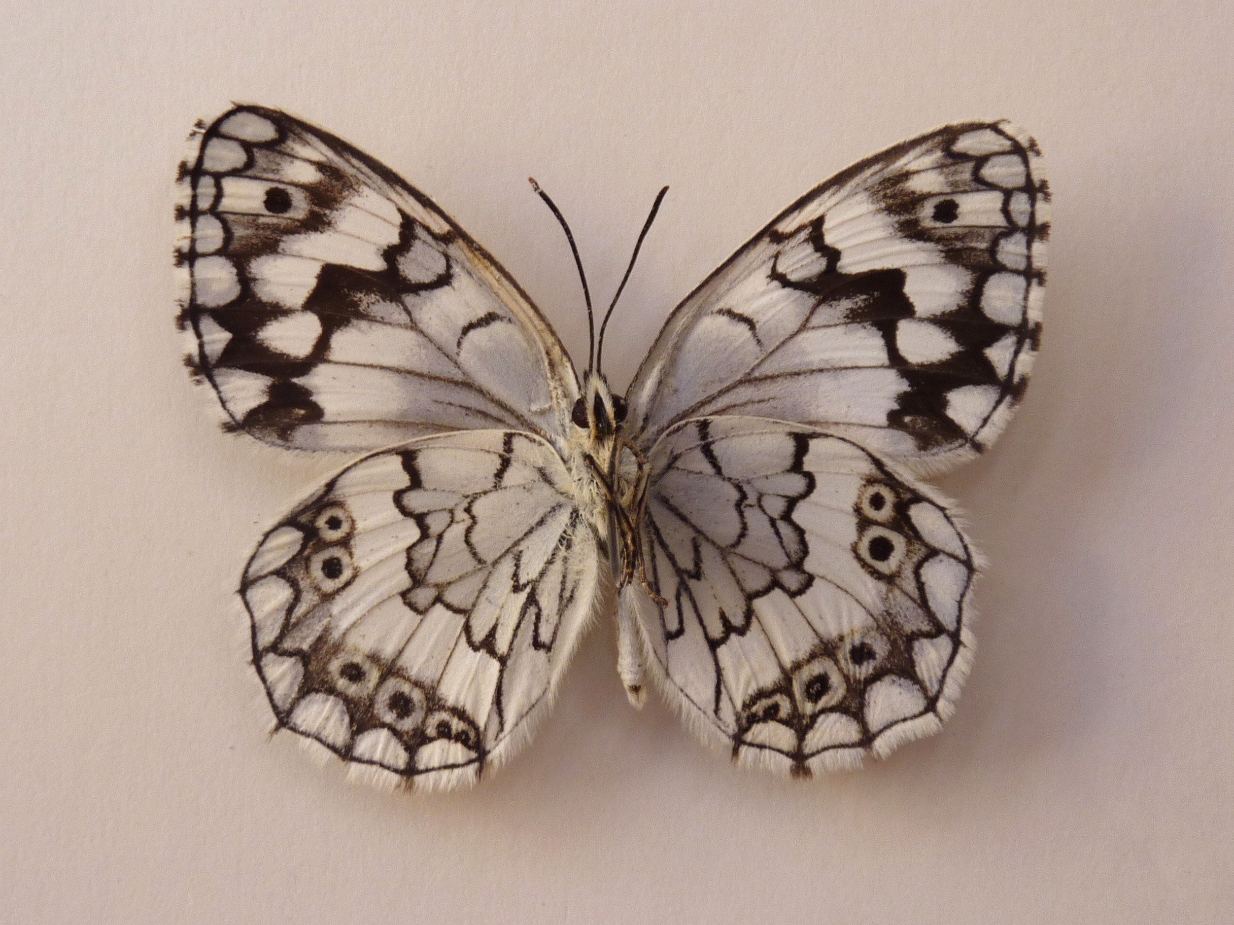 Melanargia Larissa, dessous, région de Kalavrita, Grèce, juin 2014